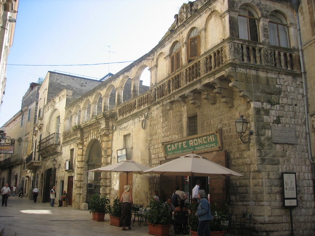 Altamura